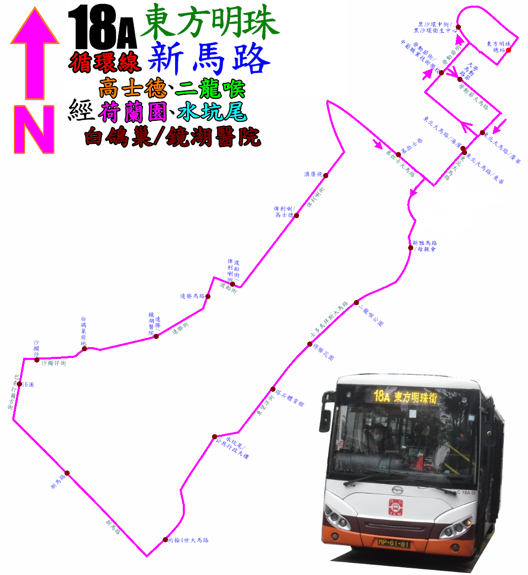 中文（香港）: 澳門巴士18A線的走線圖